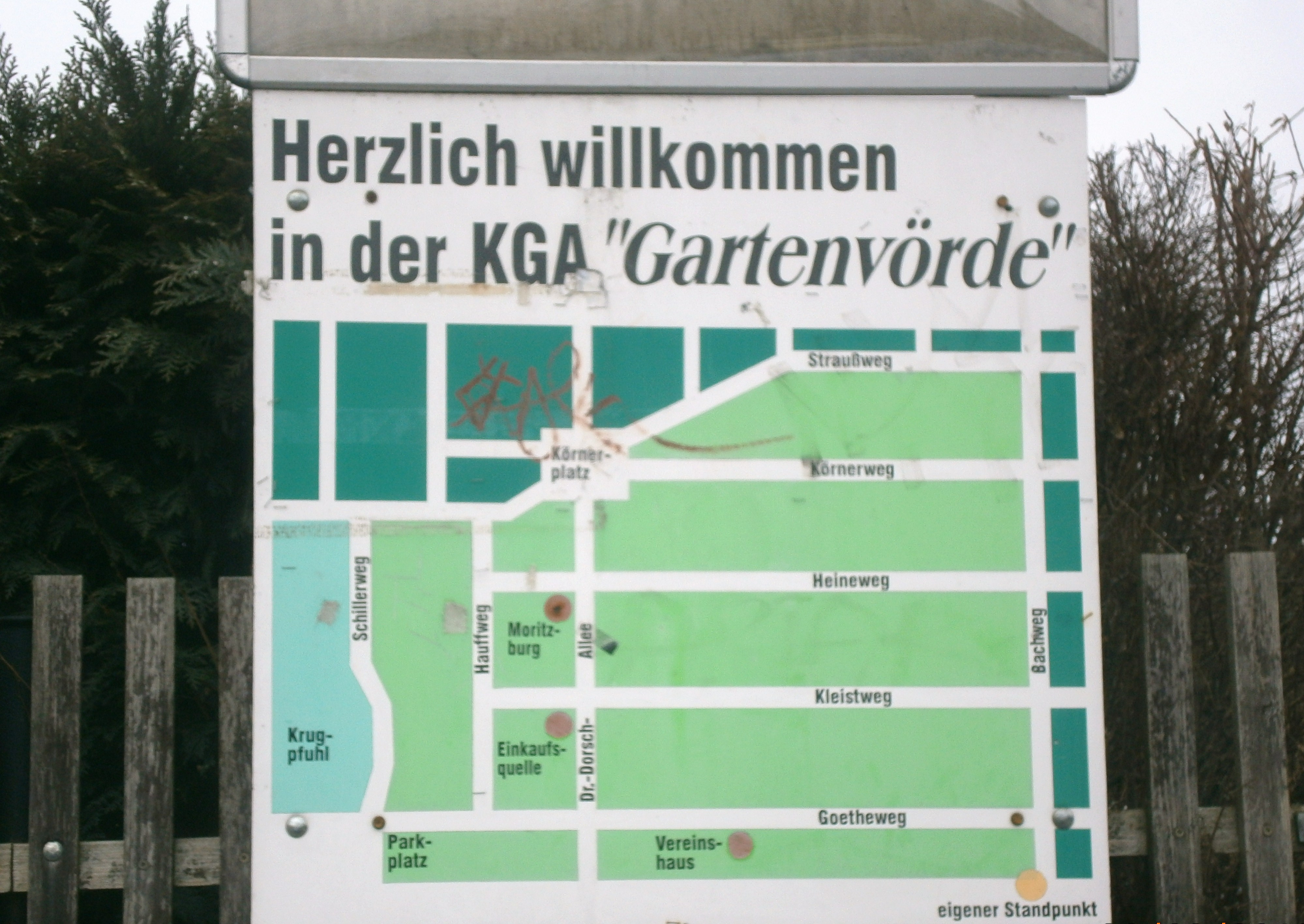 Jean-Calas ist eine Straße im Ortsteil Berlin-Französisch Buchholz (hier in Blickrichtung: Nordwestende)